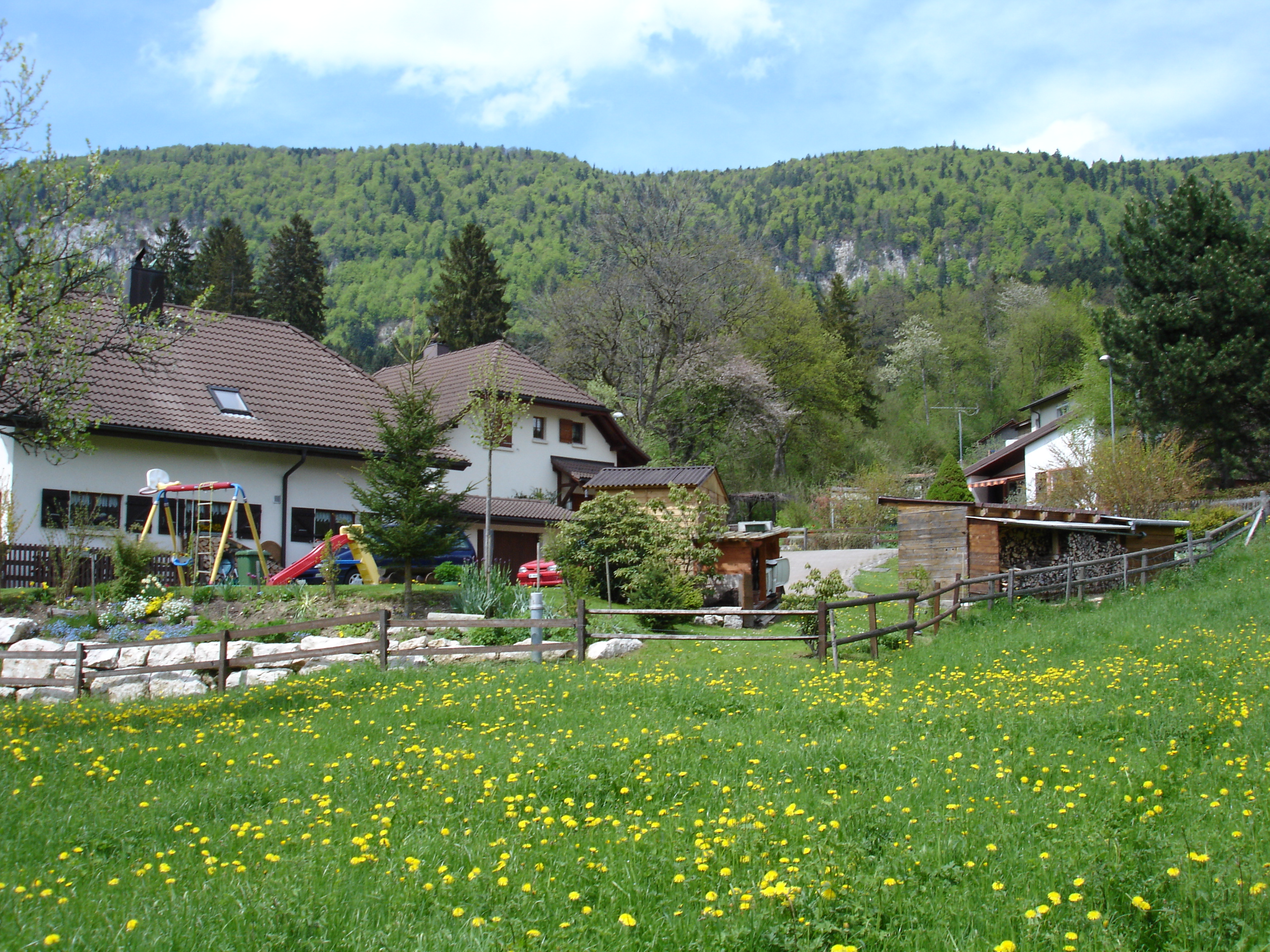 Photo de quelques maison de Champ Quin, dans le village de Pontenet prise depuis un verger.